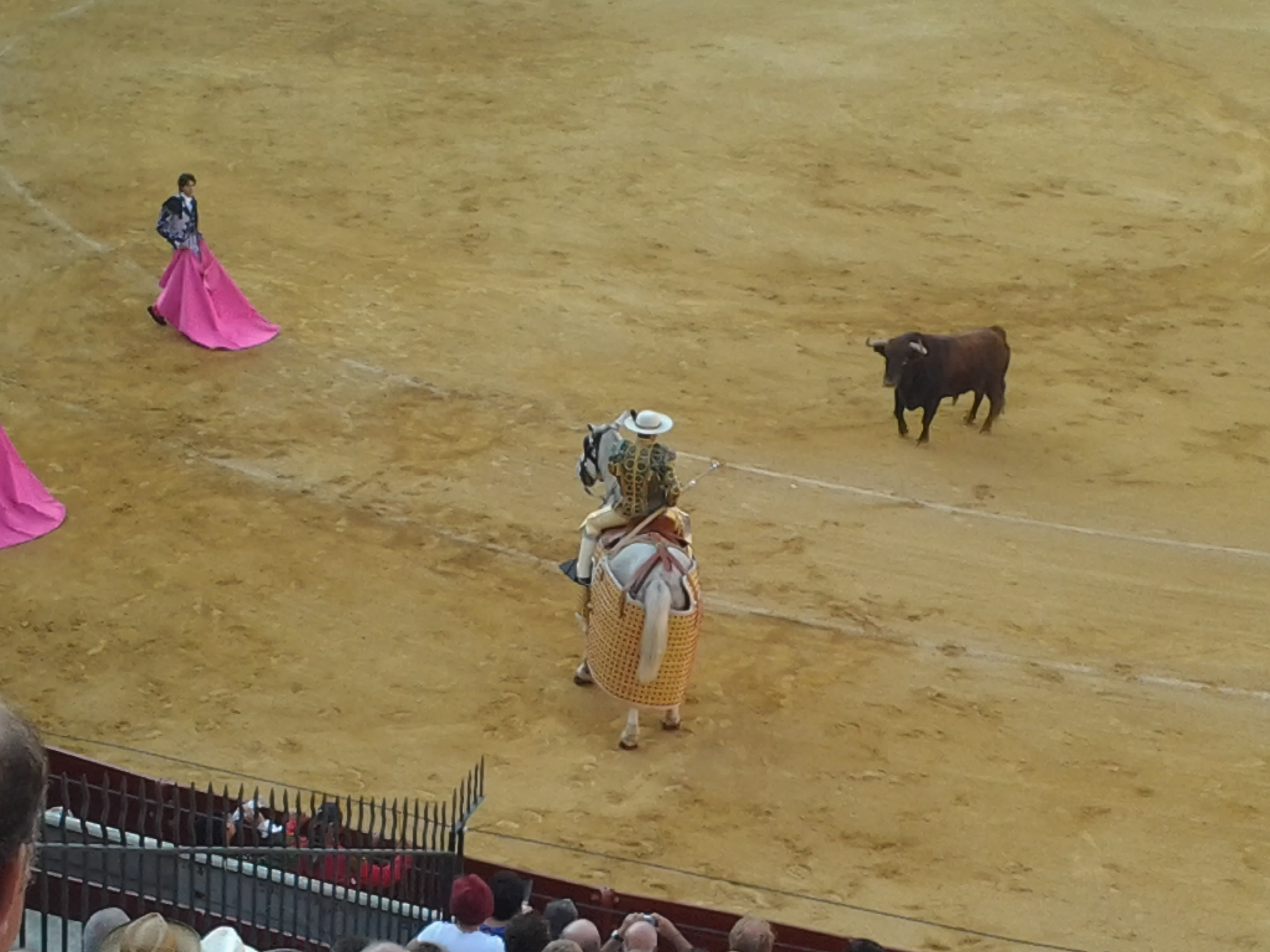 El torero francés Sebastián Castella en la corrida goyesca de agosto de 2013 en El Puerto de Santa María, Cádiz.